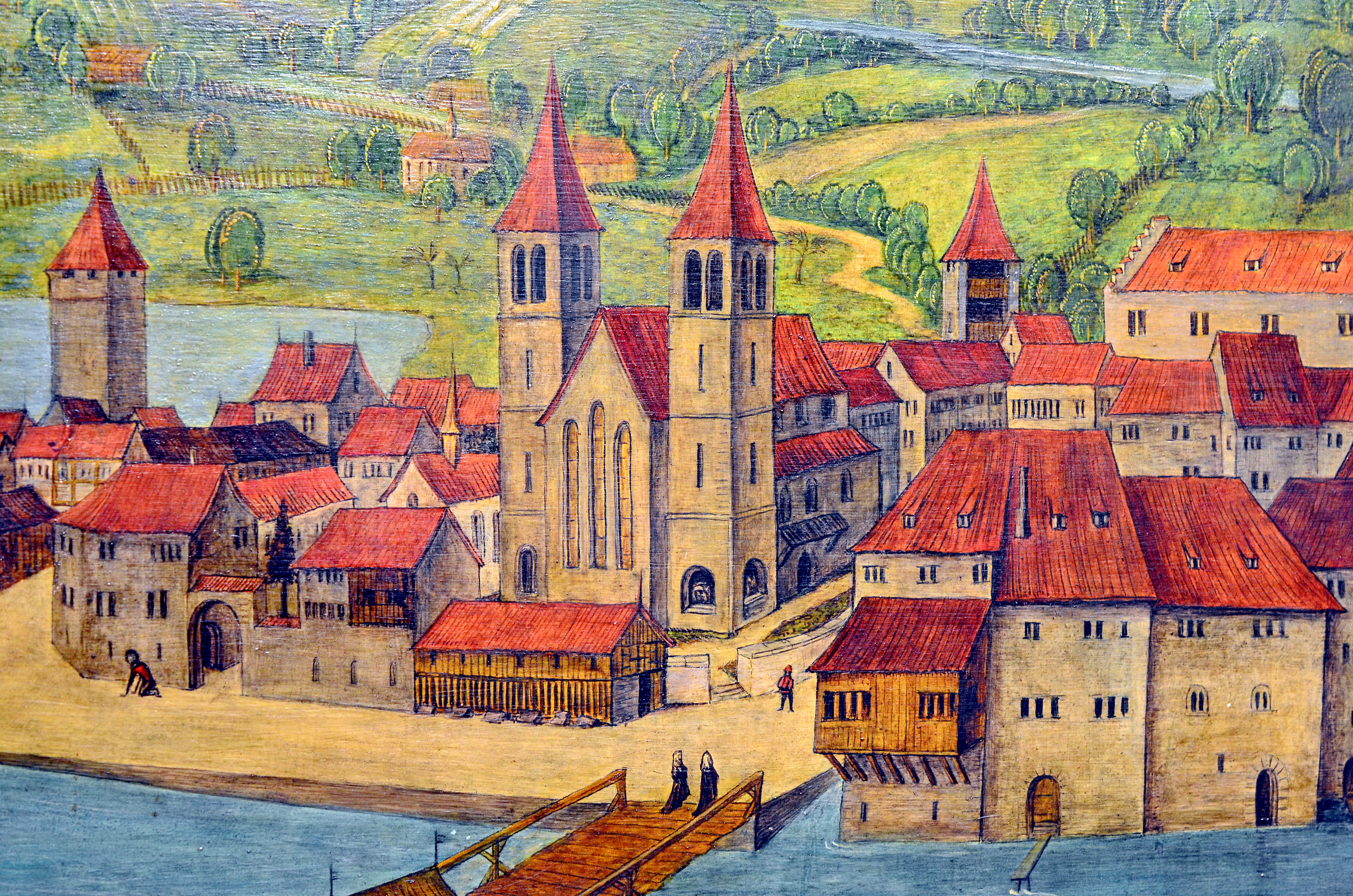 Das (von links) Kratzquartier, das Fraumünster und der Münsterhof auf der Replik der Altartafeln von Hans Leu im Baugeschichtlichen Archiv der Stadt Zürich im Haus zum Rech. Die Panoramansicht des linksseitigen Limmatufers – 'Standort' der BetrachterIn ist wohl der Karlsturm des Grossmünsters – von Hans Leu d. Ä. gilt als die älteste zuverlässige Darstellung der Stadt Zürich, Ende des 15. Jahrhunderts auf den Altartafeln im Grossmünster mit viel Liebe zum Detail festgehalten. Die originalen Tafeln sind heute im Landesmuseum ausgestellt, eine (vermutlich) 1:1 Replik ist im Stadtarchiv öffentlich zugänglich.